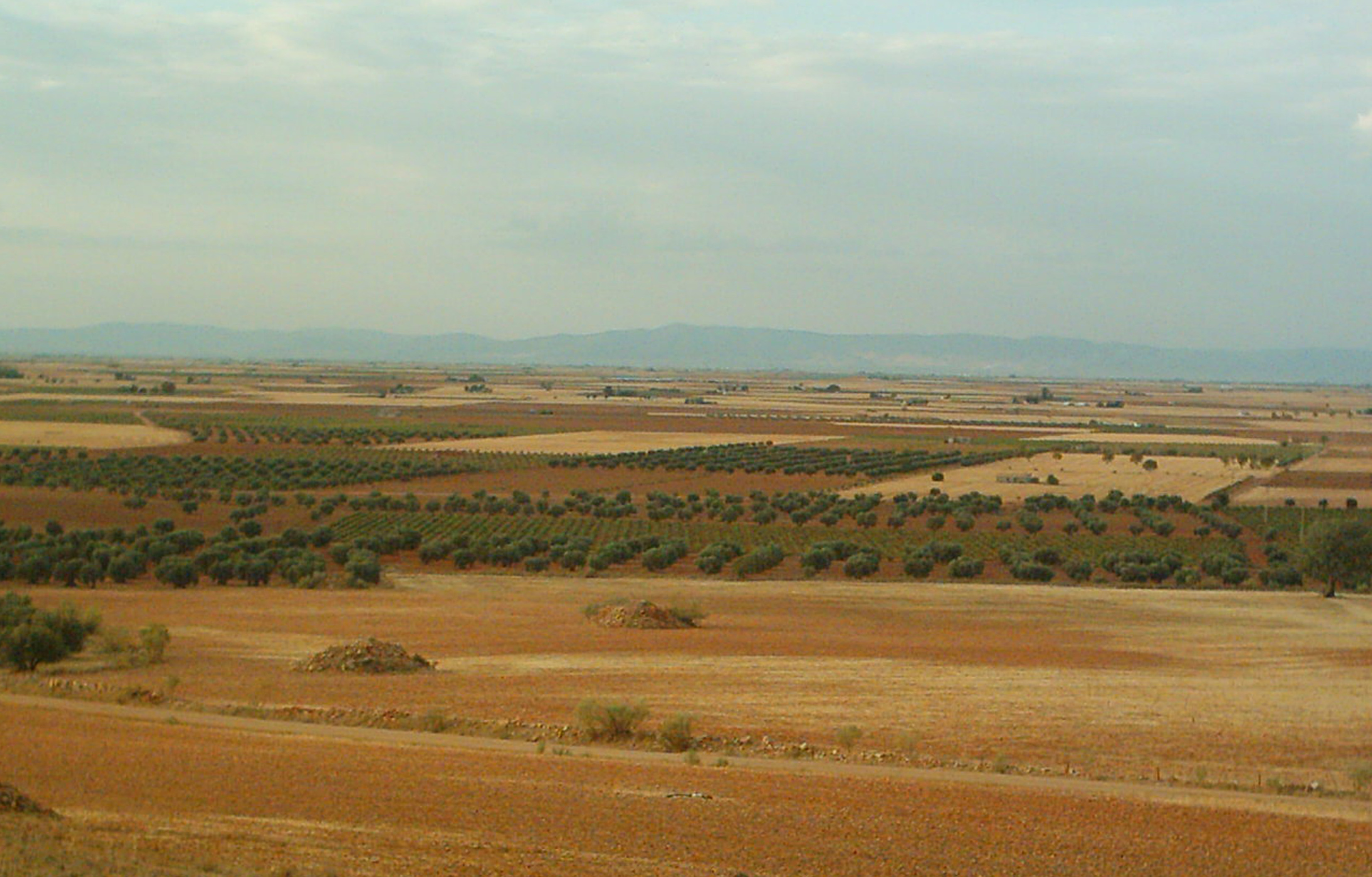 Campo de Calatrava en el termino municipal de Bolaños (C Real)